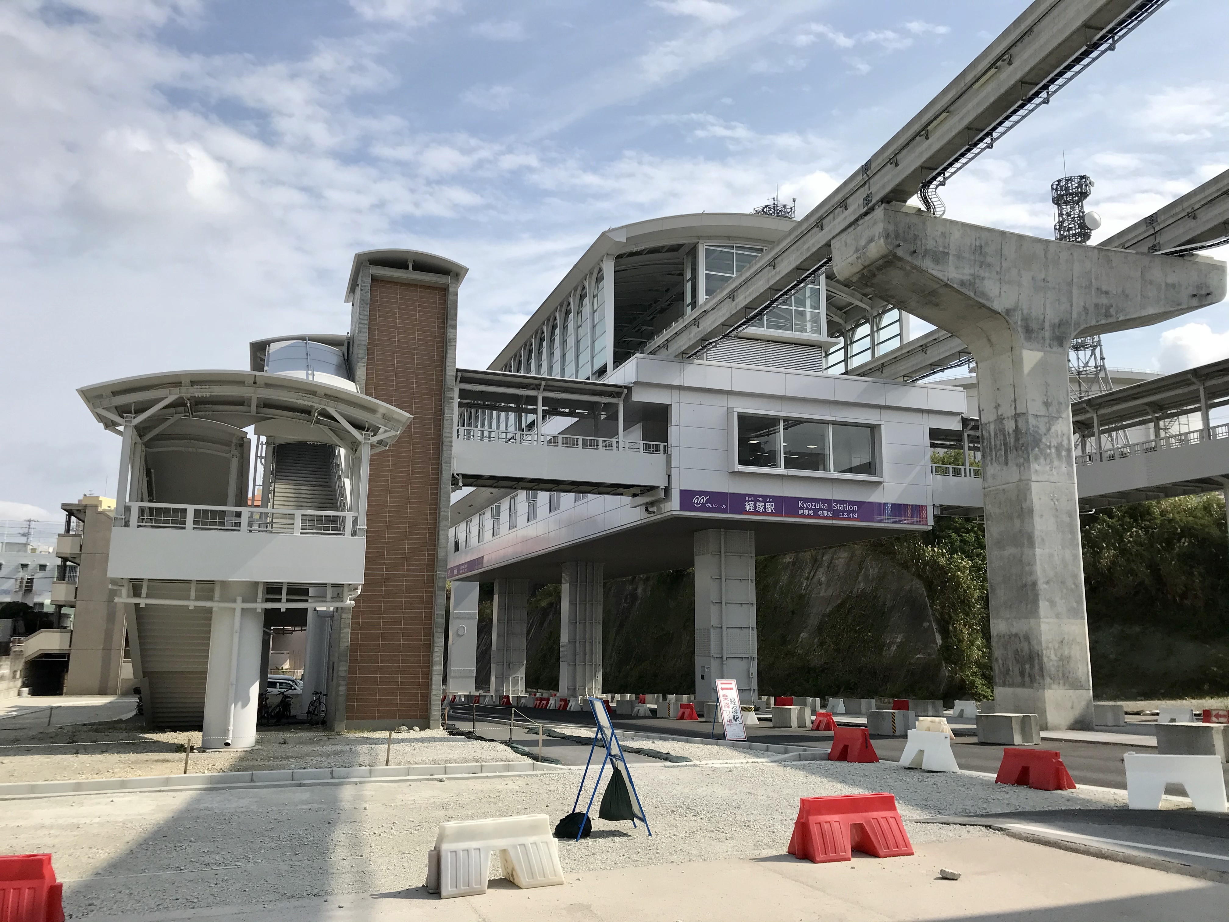 沖縄都市モノレール（ゆいレール）経塚駅